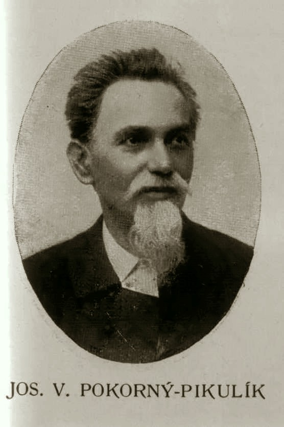 Josef Václav Pokorný-Pikulík (1842 - 1933), Český vlastenecký básník.